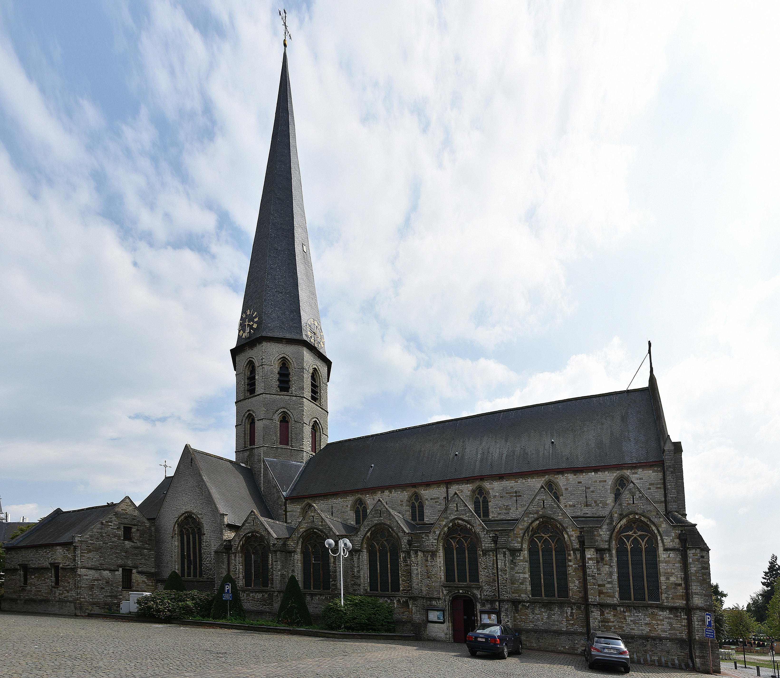 Onze-Lieve-Vrouwekerk (Kruibeke) 21-08-2018 This photo of immovable heritage has been taken in the Flemish Region